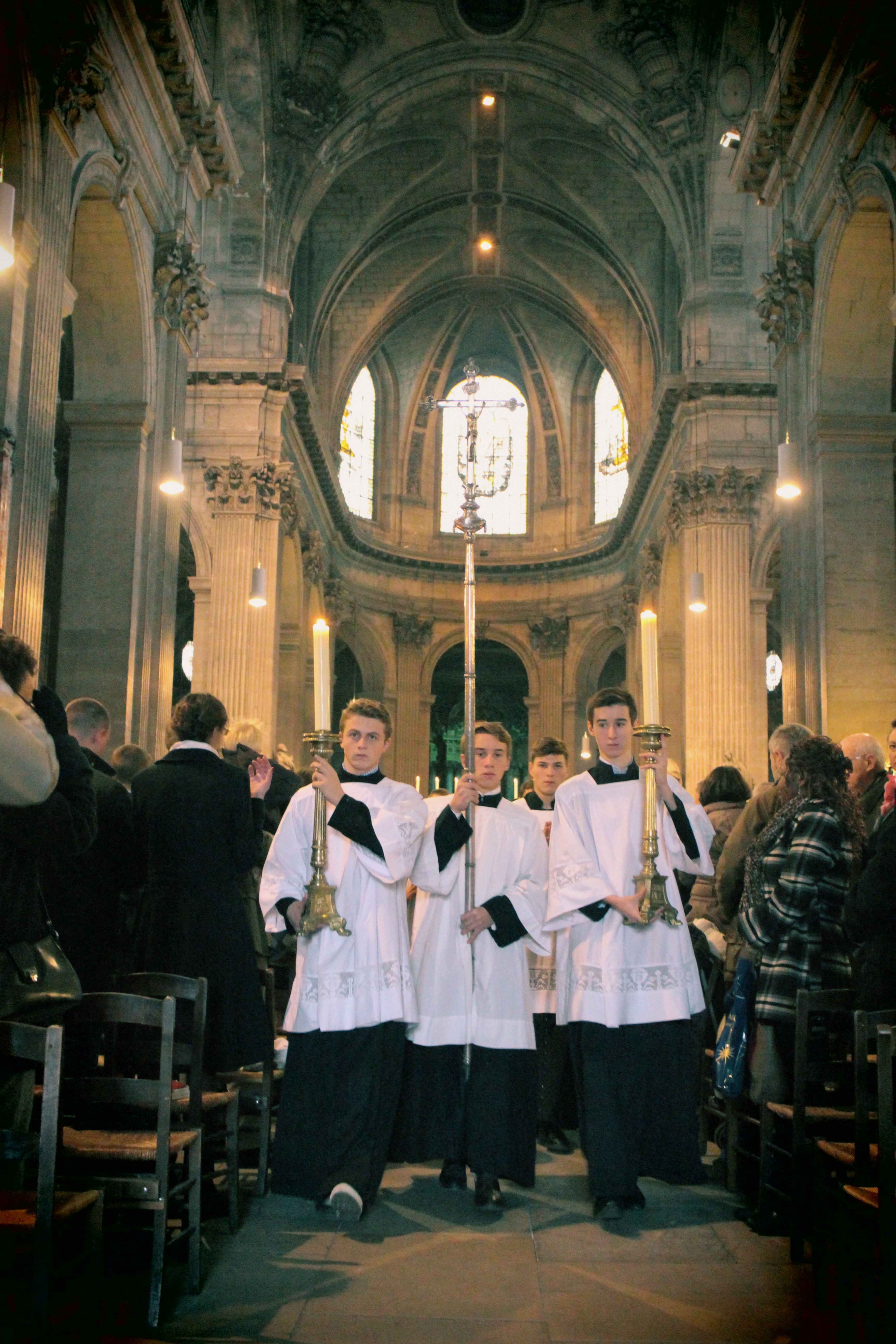 Messe solennelle d'action de grâce pour les 25 ans de la fraternité sacerdotale Saint-Pierre. Messe solennelle dans la forme extraordinaire du rite romain, en actions de grâce pour les 25 ans de la fraternité sacerdotale Saint-Pierre dans l'église Saint Sulpice à Paris.